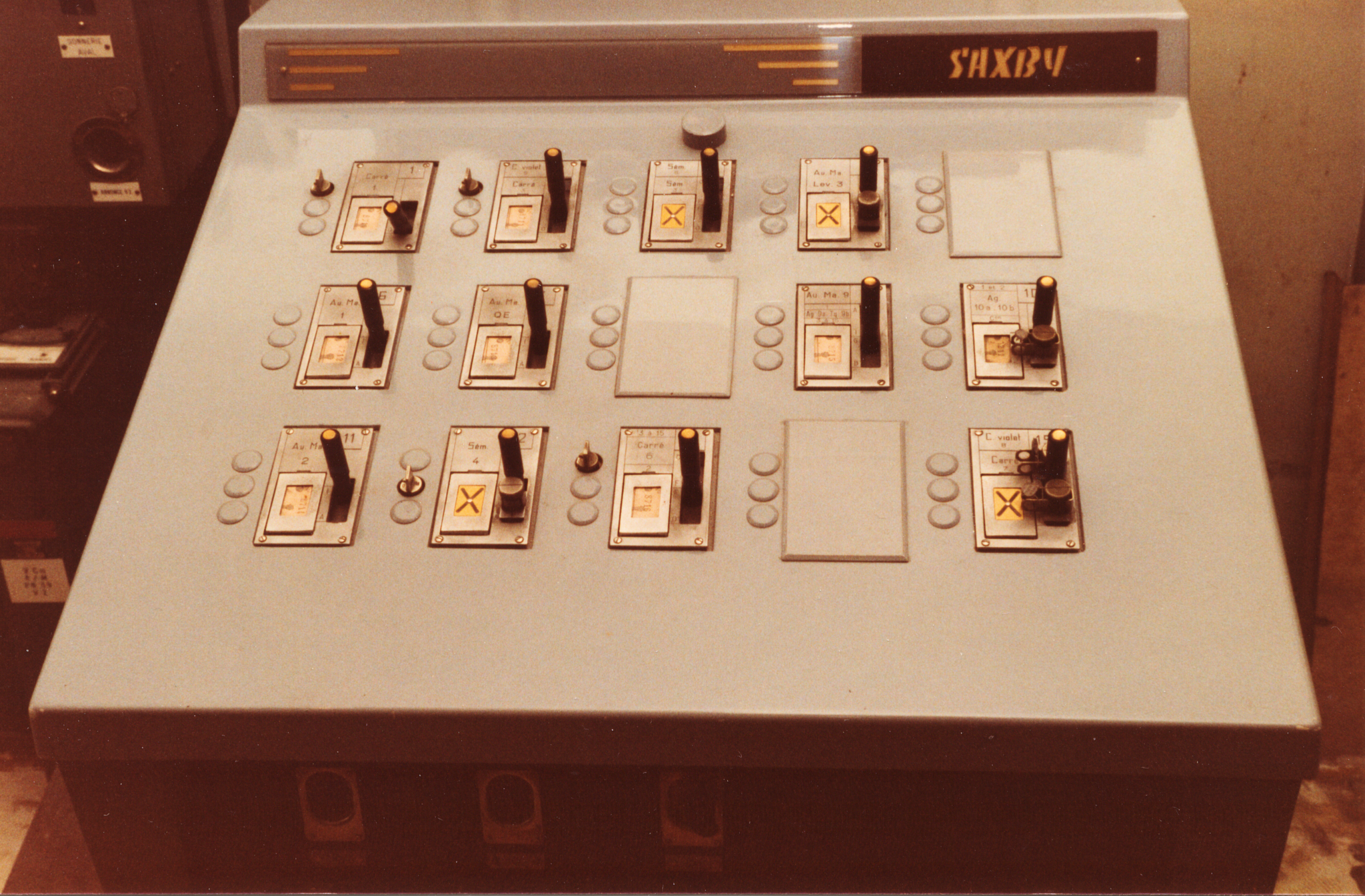 France DIGOIN Poste d'aiguillage de type PELI (Saxby)